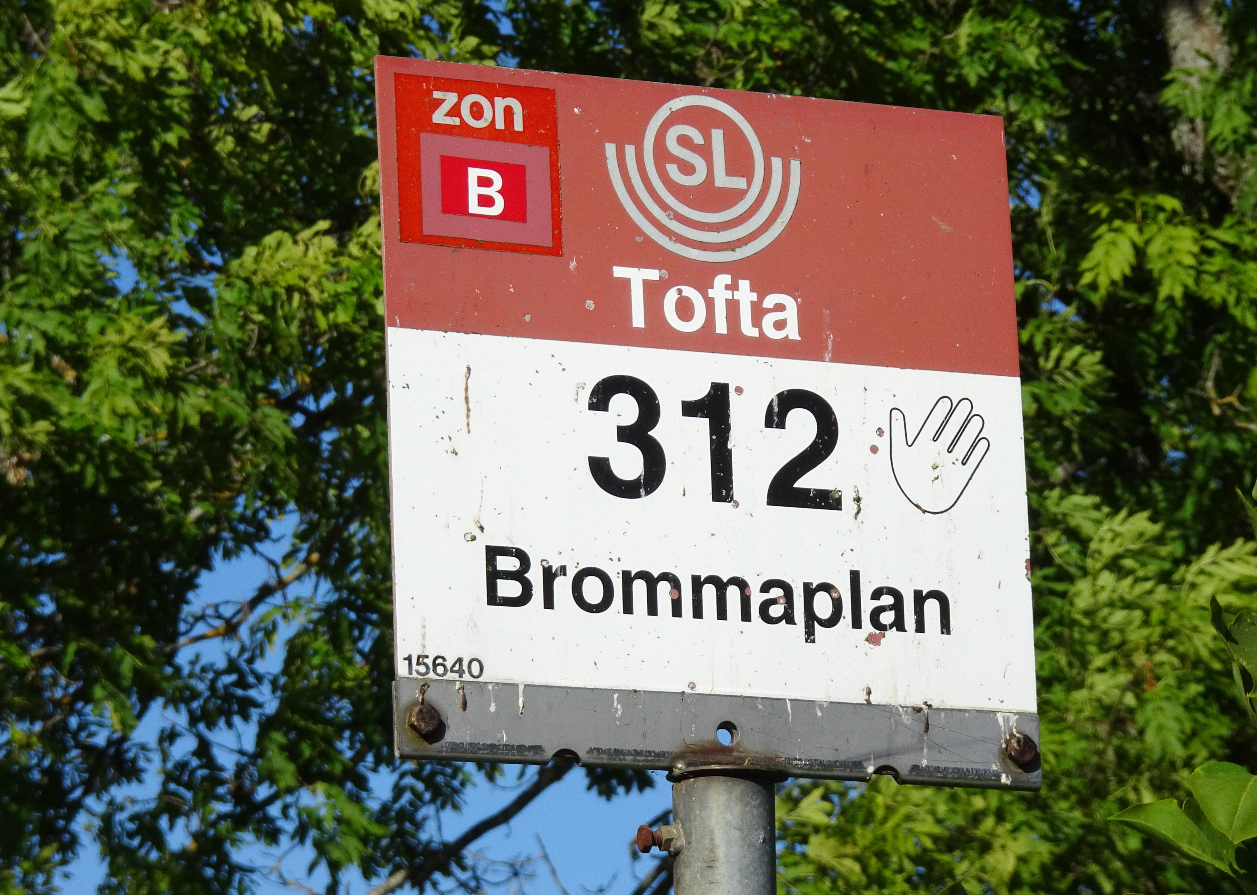 Tofta, Adelsö, busshållplatsen